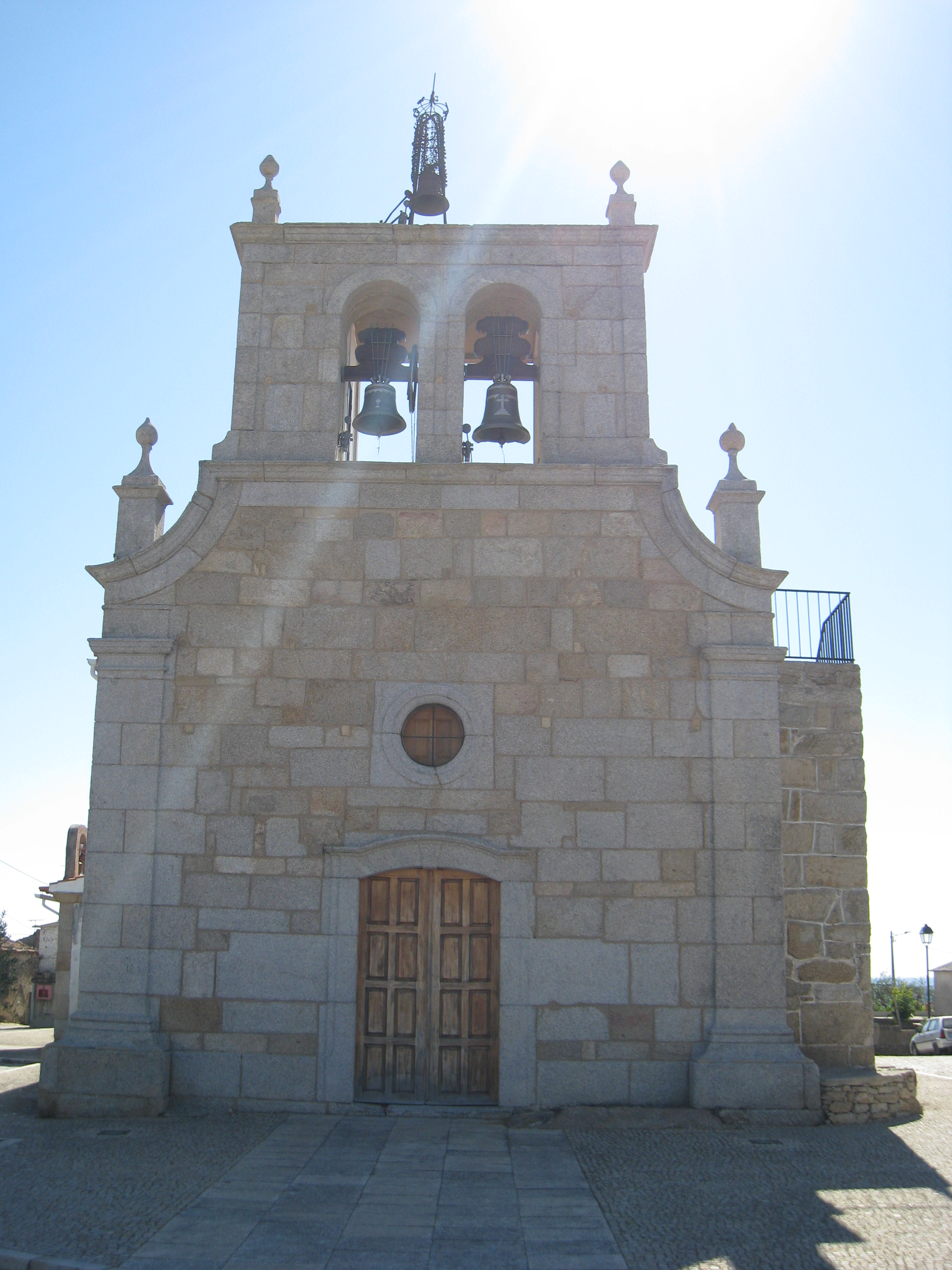 Bemposta